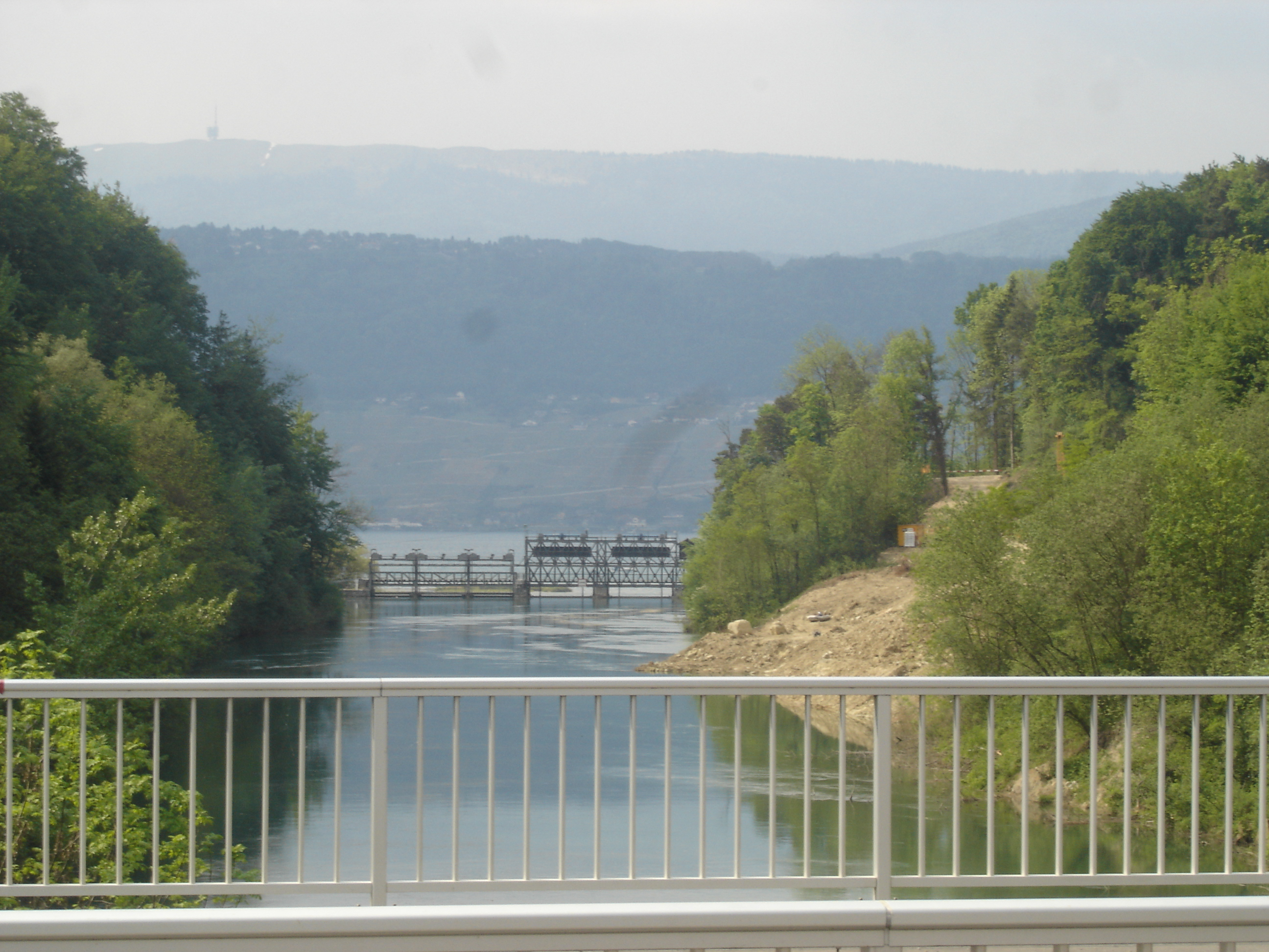 Mündung des Hagneckkanals in den Bielersee bei Hagneck. Im Hintergrund ist das Stauwehr Hagneck zu sehen. Auf der rechten Seite wird der Kanal nach einem Hangrutsch im Frühling 2006 wieder auf sein ursprüngliches Profil ausgebaggert.